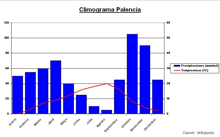 Descripción/description: Climograma de la ciudad de Palencia (España) / Climate graph of the city of Palencia (Spain) Fuente/source: Datos del usuario C.París. / Dates courtesy of the user C.París. Autor/Author: Es-Montgomery Fecha/date: 7 de Febrero de 2007/ February, 7, 2007. Permiso/Permission: Trabajo propio de libre difusión/ Own work. Free diffusion.